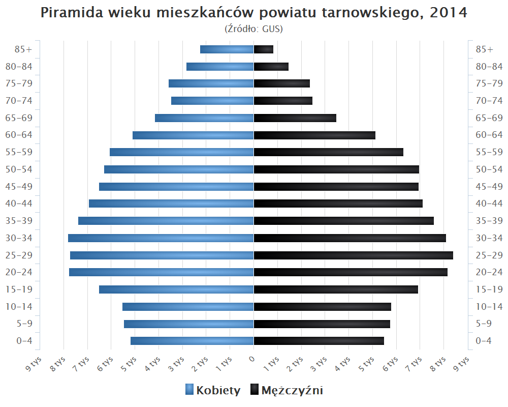 Piramida wieku mieszkańców powiatu tarnowskiego, 2014